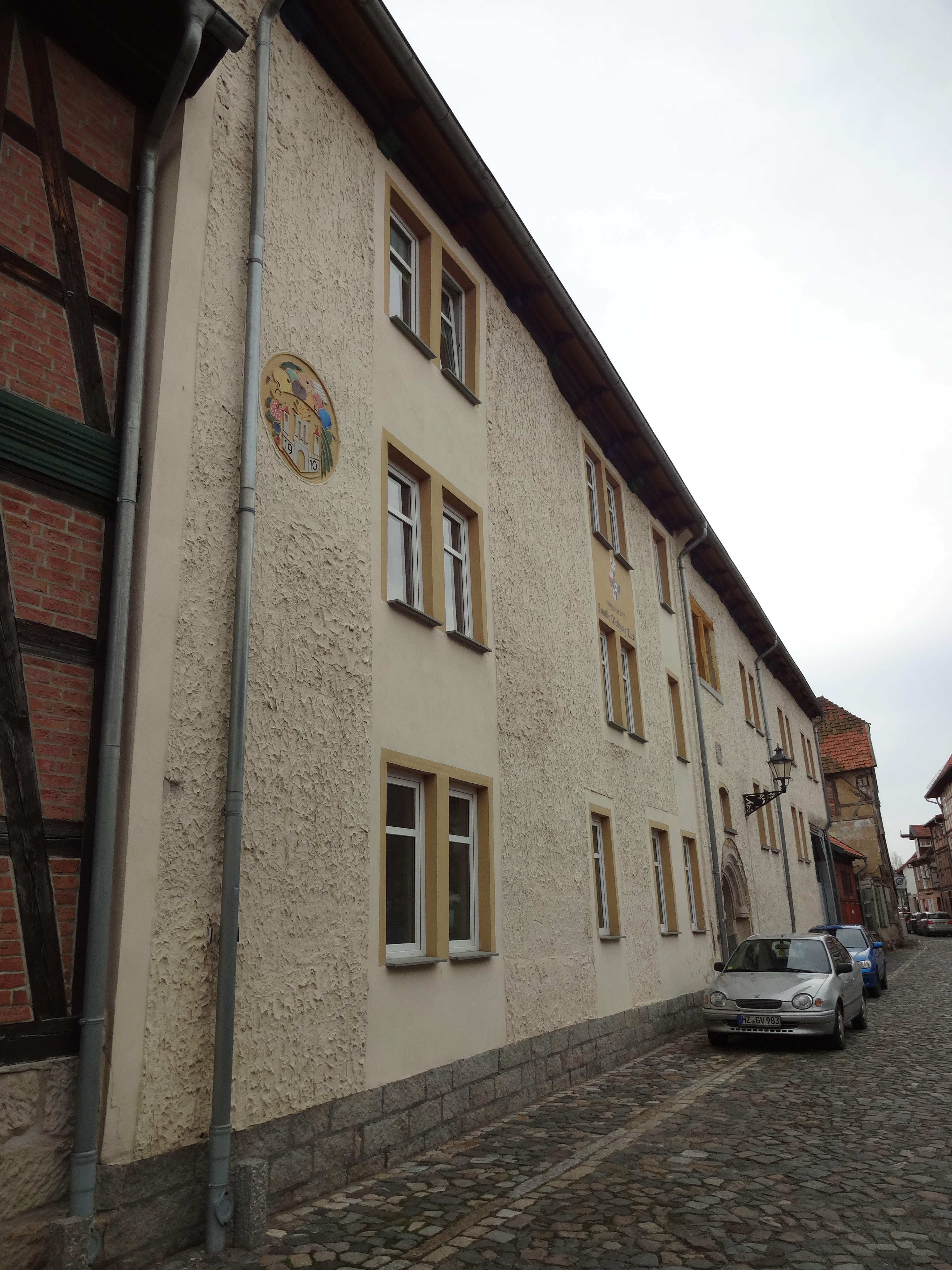 denkmalgeschütztes Fachwerkhaus in der Pfeifferstraße 2 in Derenburg, Ortsteil von Blankenburg (Harz)